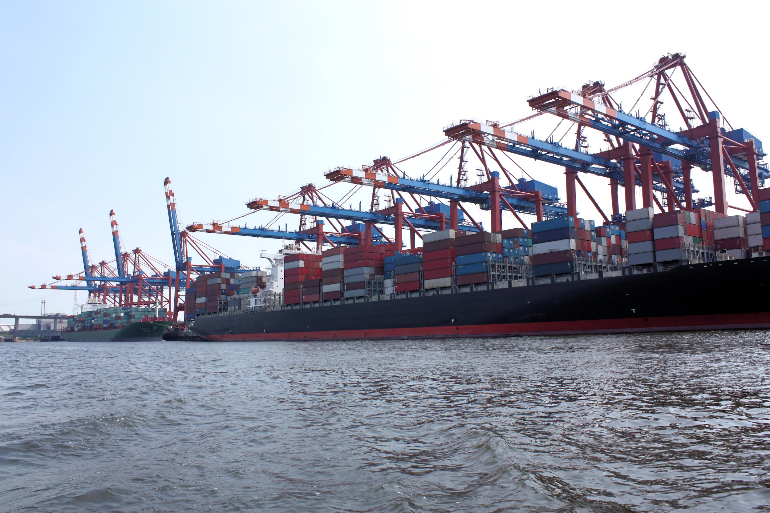 Containerterminal im Hamburger Hafen